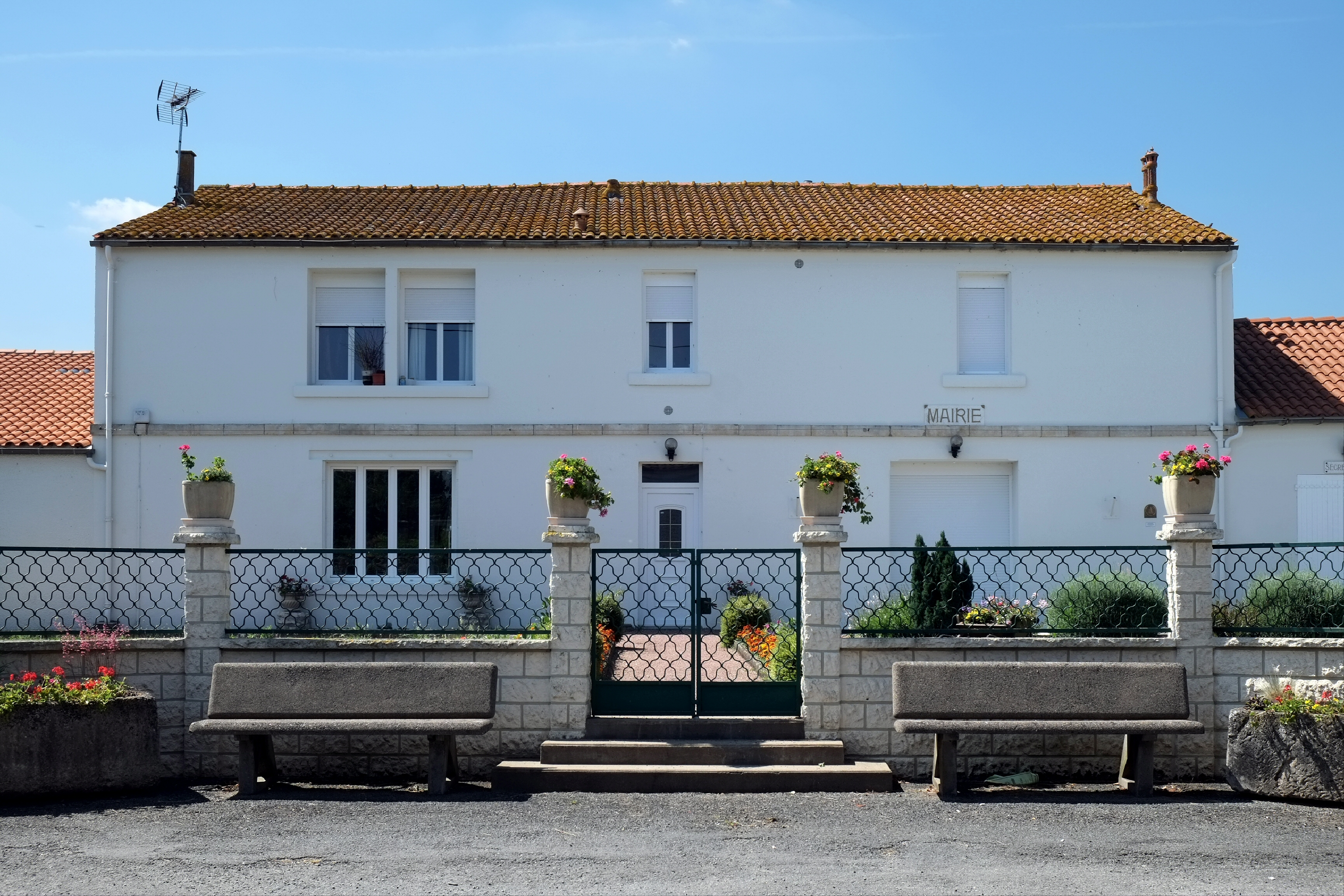 Mairie Saint-Cyr-du-Doret Charente-Maritime France